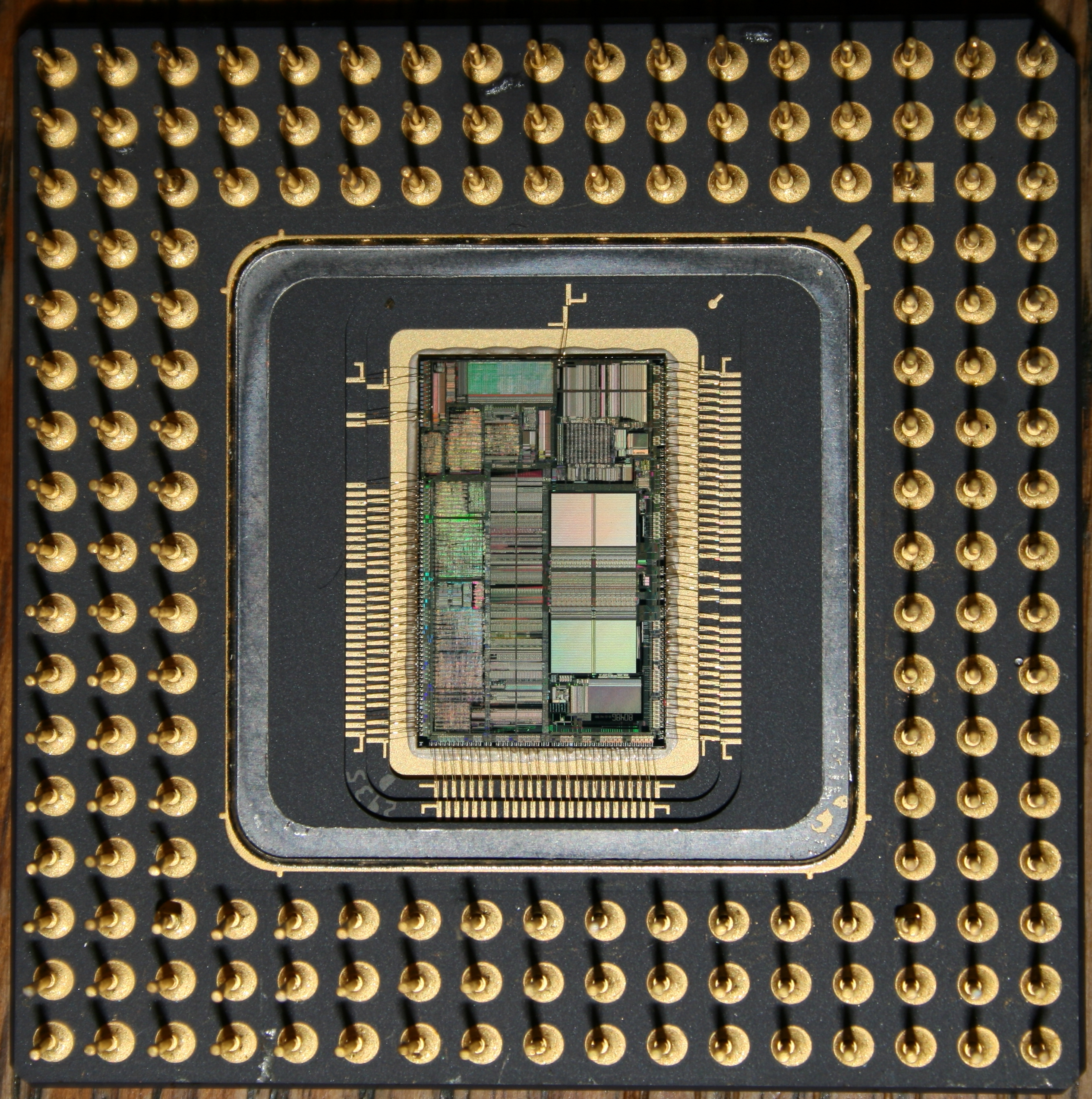 Geöffnete 80486 CPU von Intel